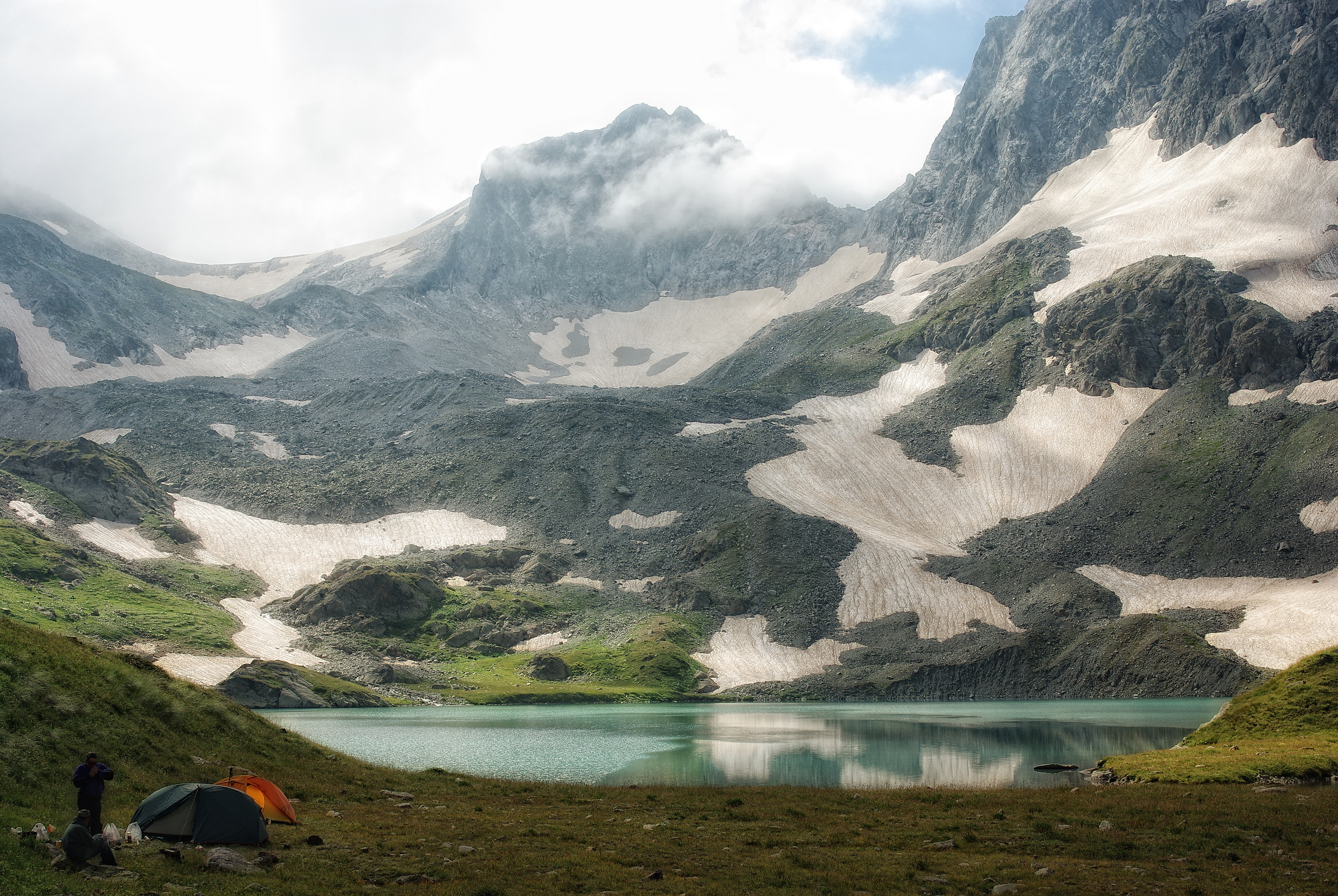 Кавказский заповедник, Урупский район, стоянка у Большого Имеретинского озера This image is related to the protected area of Russia number 0900057